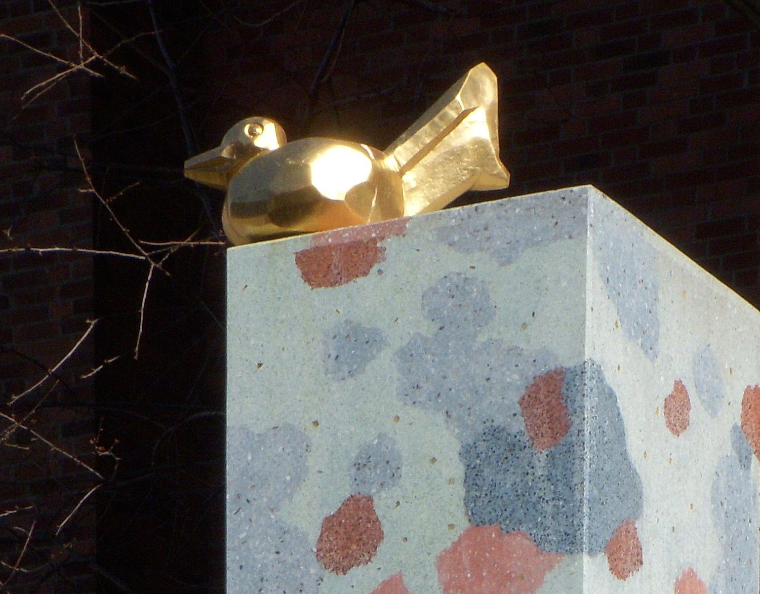 Skulptur av Enno Hallik utanför Astrid Lindgrens barnsjukhus i Stockholm "Pippi L" från 1998. Den föreställer ett stort "L" med en guldfågel på toppen.